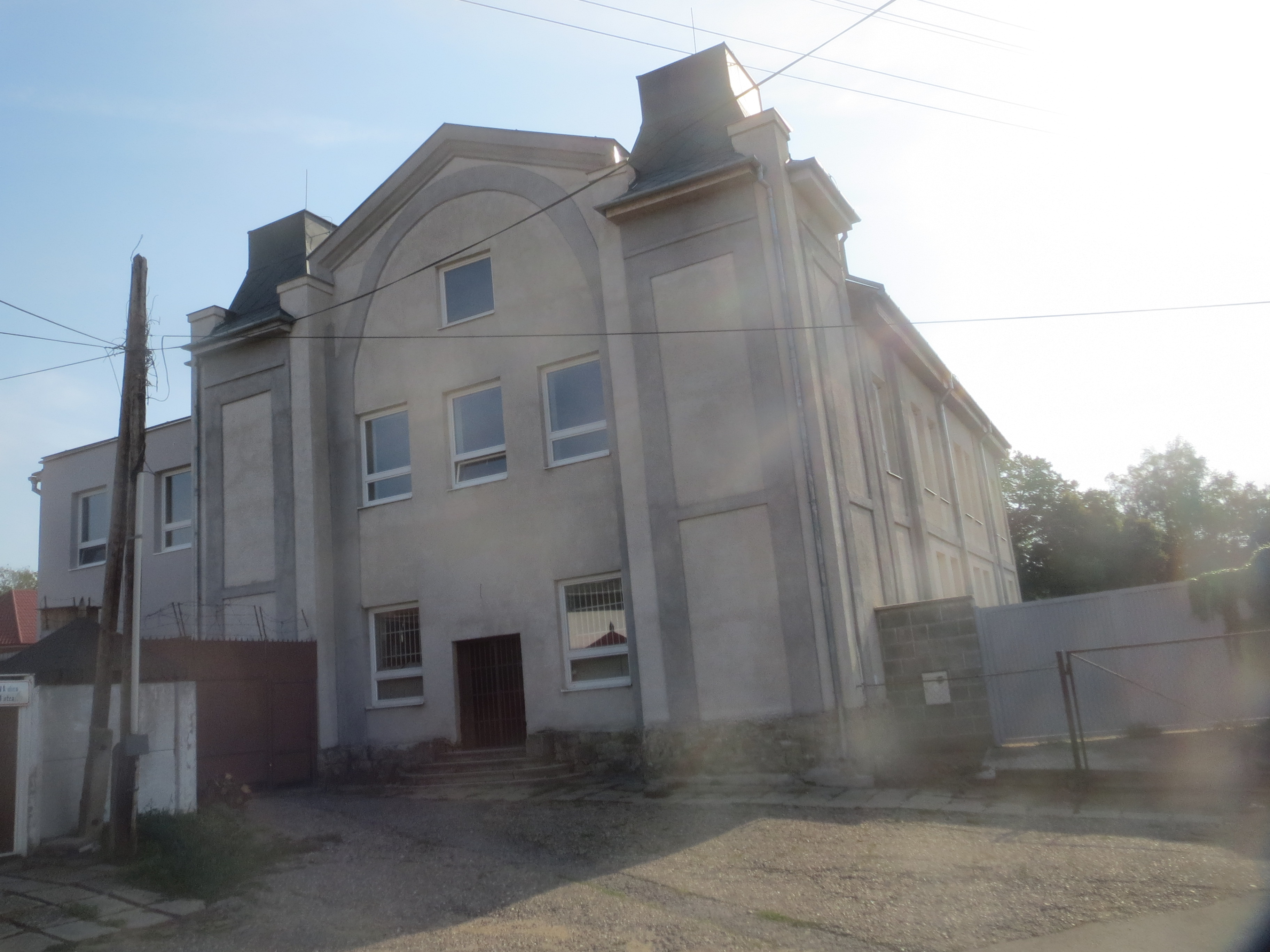 Front Orthodoxe Synagoge Šahy